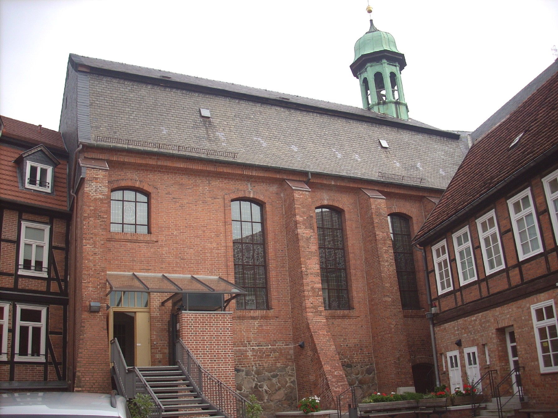 Schwerin, kath. Propsteikirche St. Anna, Hofseite